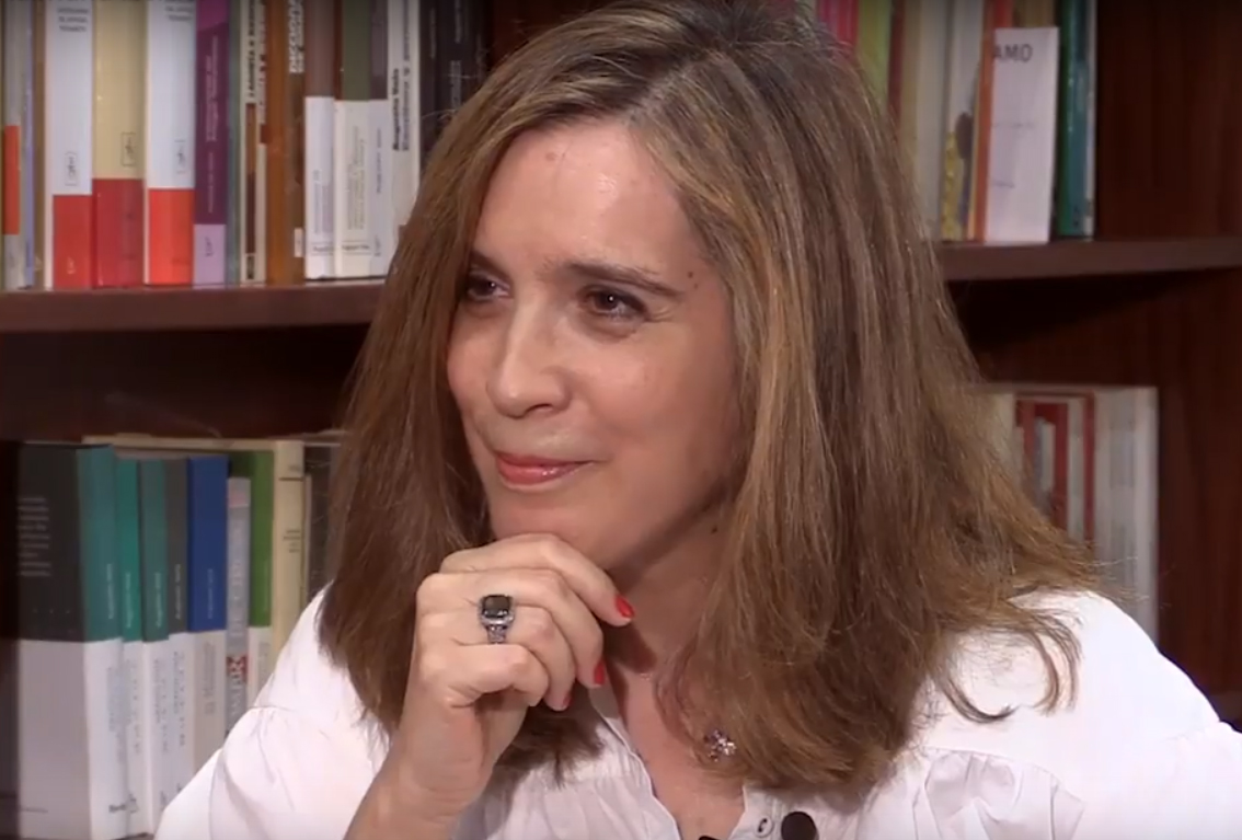 Anna Pagés. Entrevista con Raimund Herder